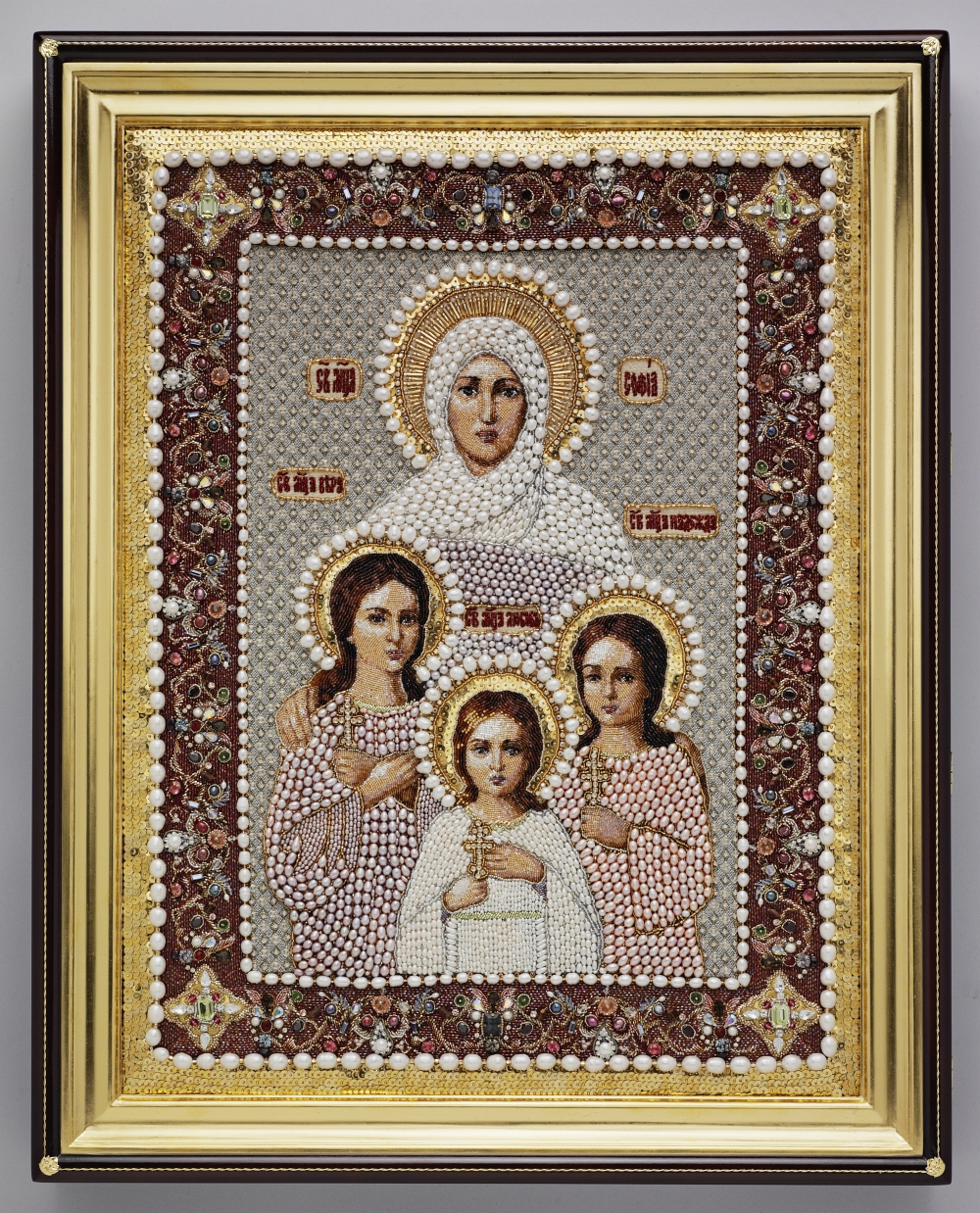 Православная икона "Вера, Надежда, Любовь и Софья" работы творческой мастерской Натальи Краснославовны Горковенко "Прикосновение".